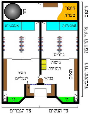 מבנה של סנטו